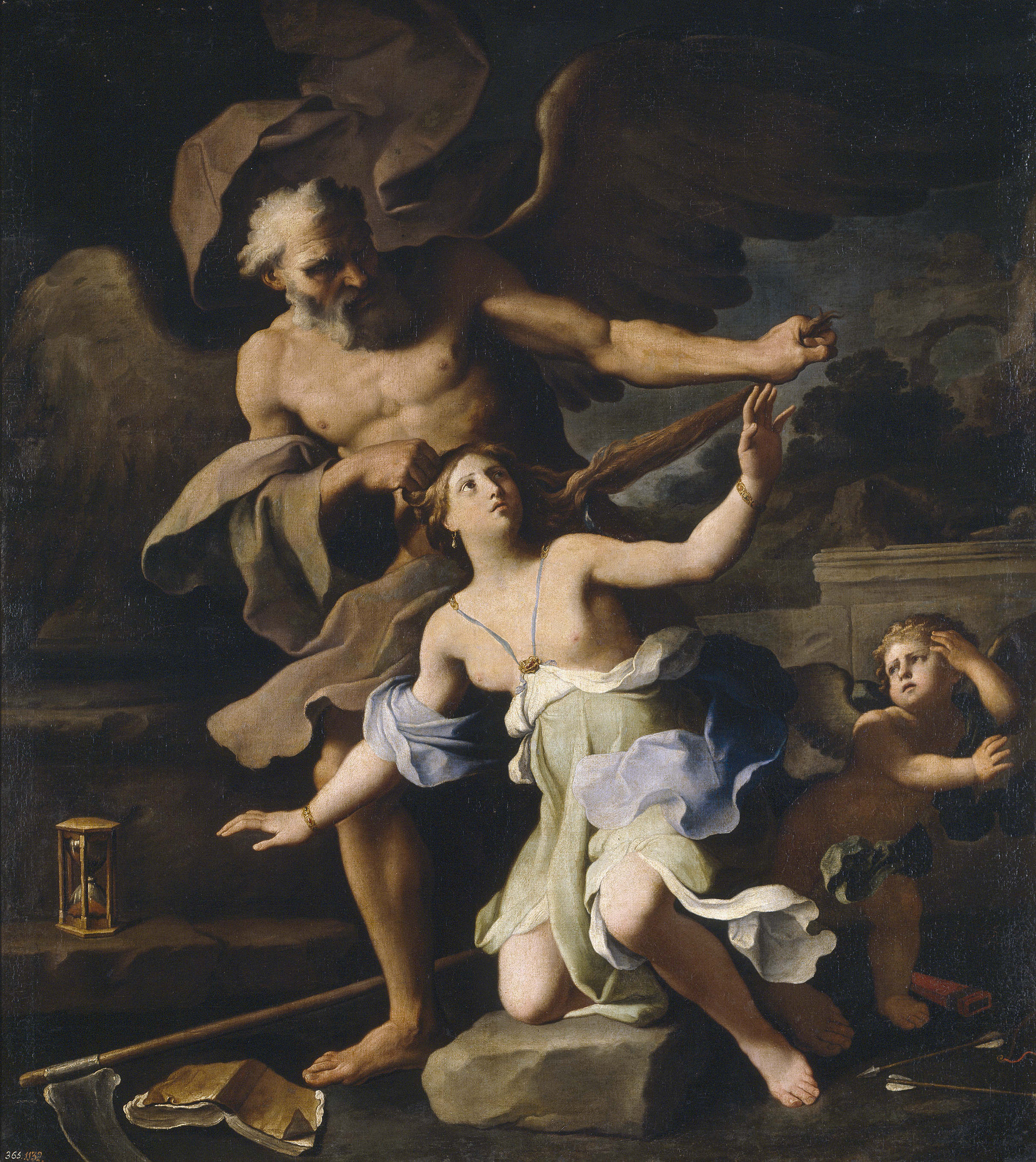 El Tiempo destruyendo la hermosuraTime destroys Beautylabel QS:Les,"El Tiempo destruyendo la hermosura"label QS:Len,"Time destroys Beauty"